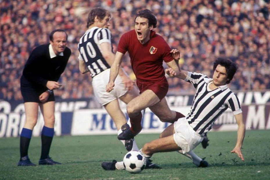 Campionato italiano di Serie A 1976-77, 23ª giornata. Torino, stadio Comunale, 3 aprile 1977. Juventus-Torino 1-1 (6' F. Causio, 8' P. Pulici). Il torinista Francesco Graziani (al centro) elude il tackle di Gaetano Scirea mentre Romeo Benetti (con il n. 10) è superato. L'arbitro è il milanese Paolo Casarin.